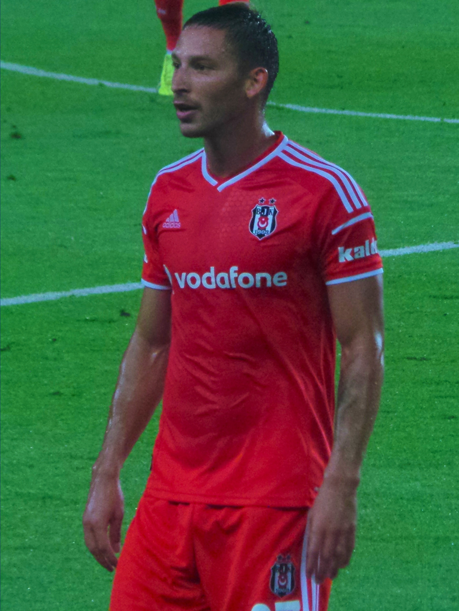 Filip Holosko @ Chelsea - FB SOMA Tournament